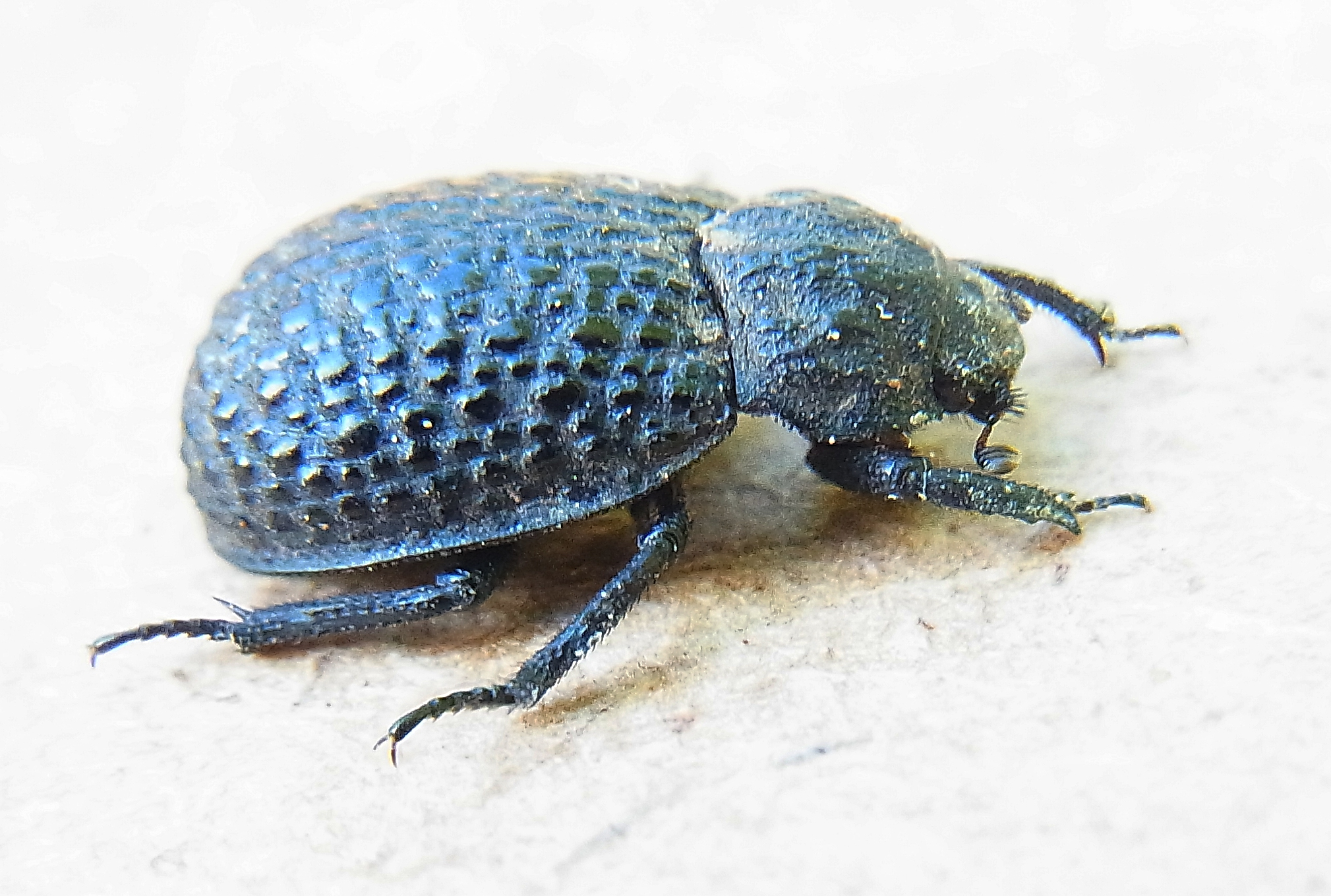 Trox perlatus aus Spanien, 25471 La Pobla de Cérvoles, LLeida am 10. Juni 2013